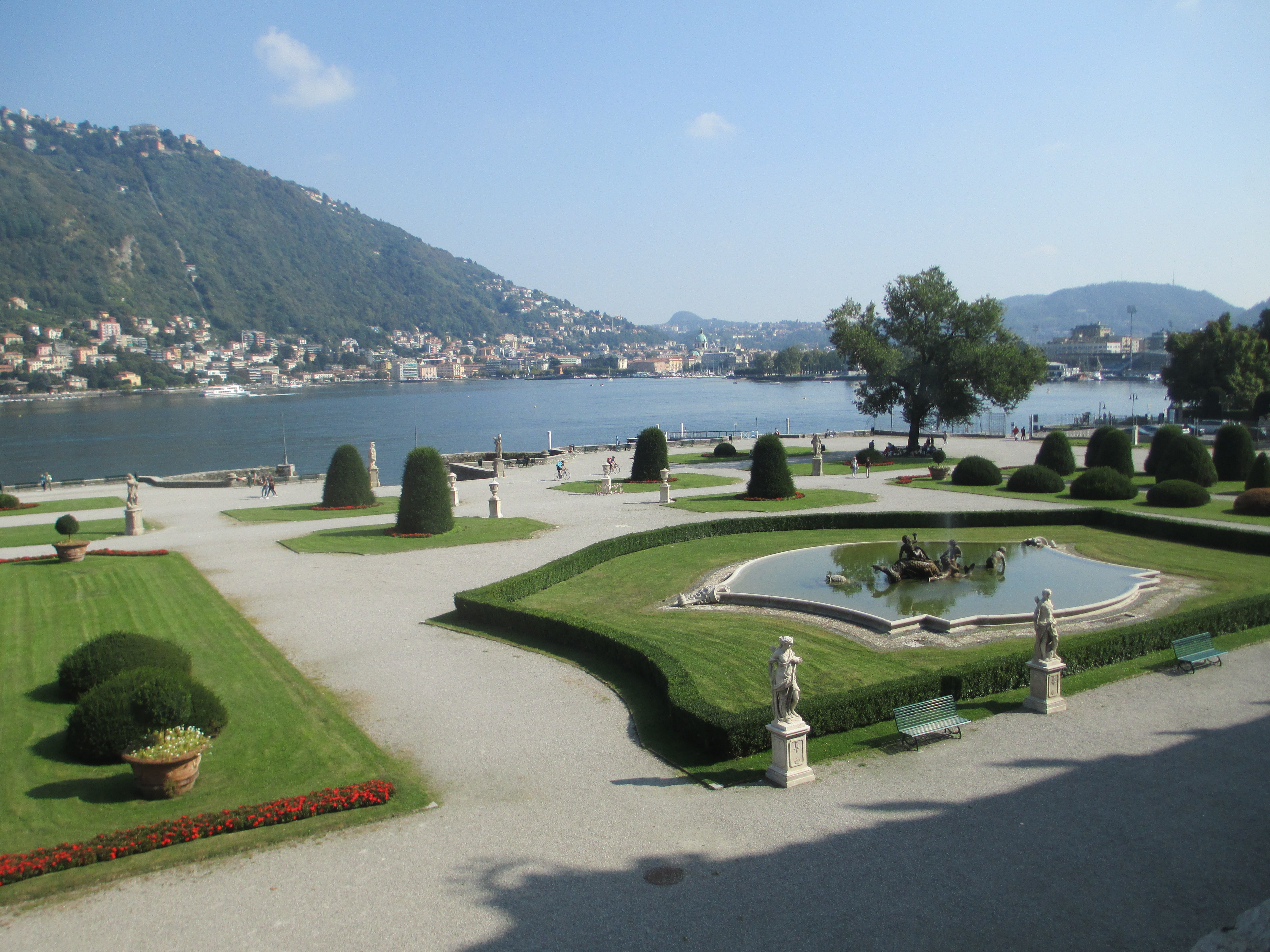 Parco antistante Villa Olmo, a Como. This is a photo of a monument which is part of cultural heritage of Italy.